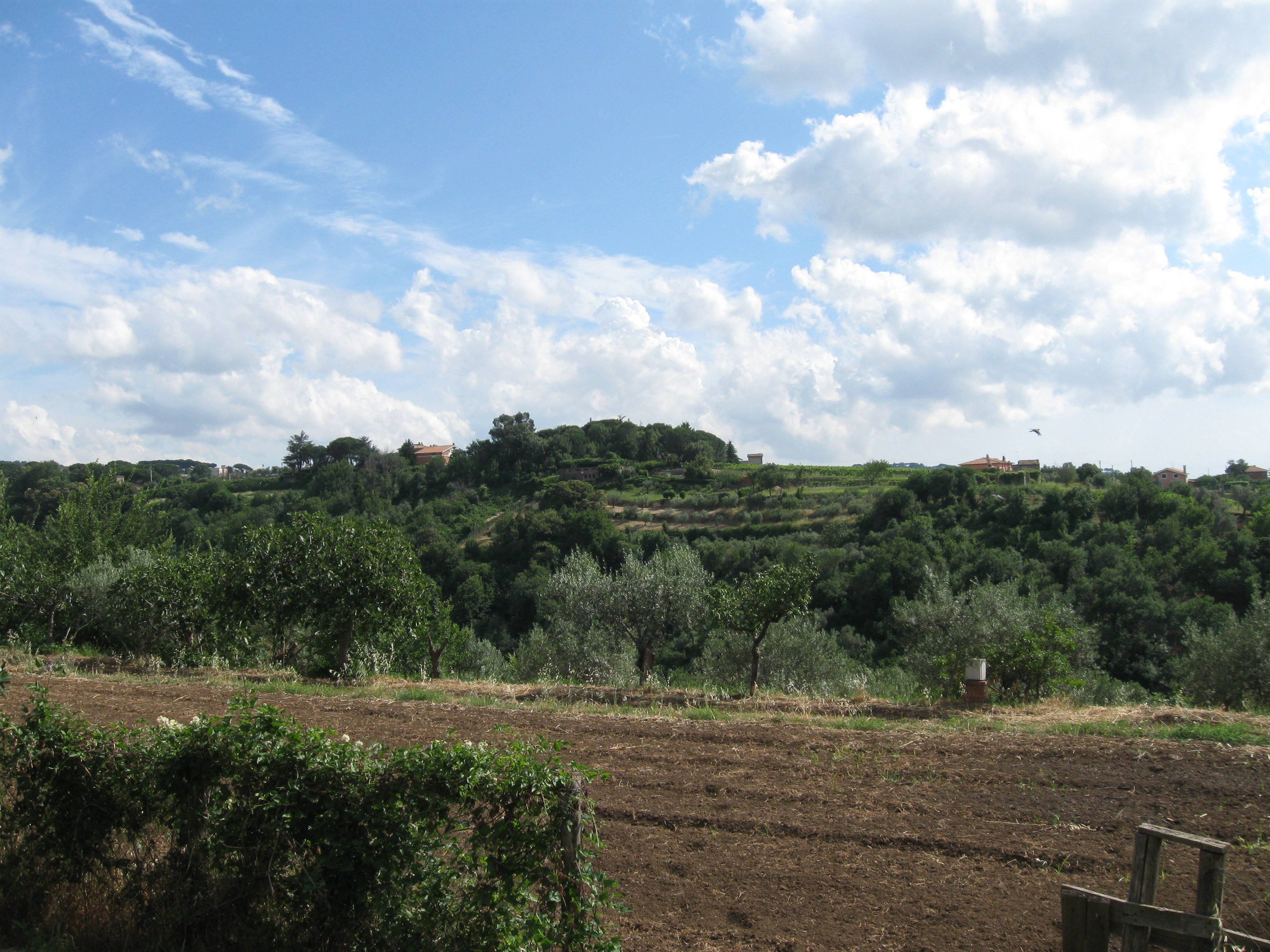 Campagna di grottaferrata 01